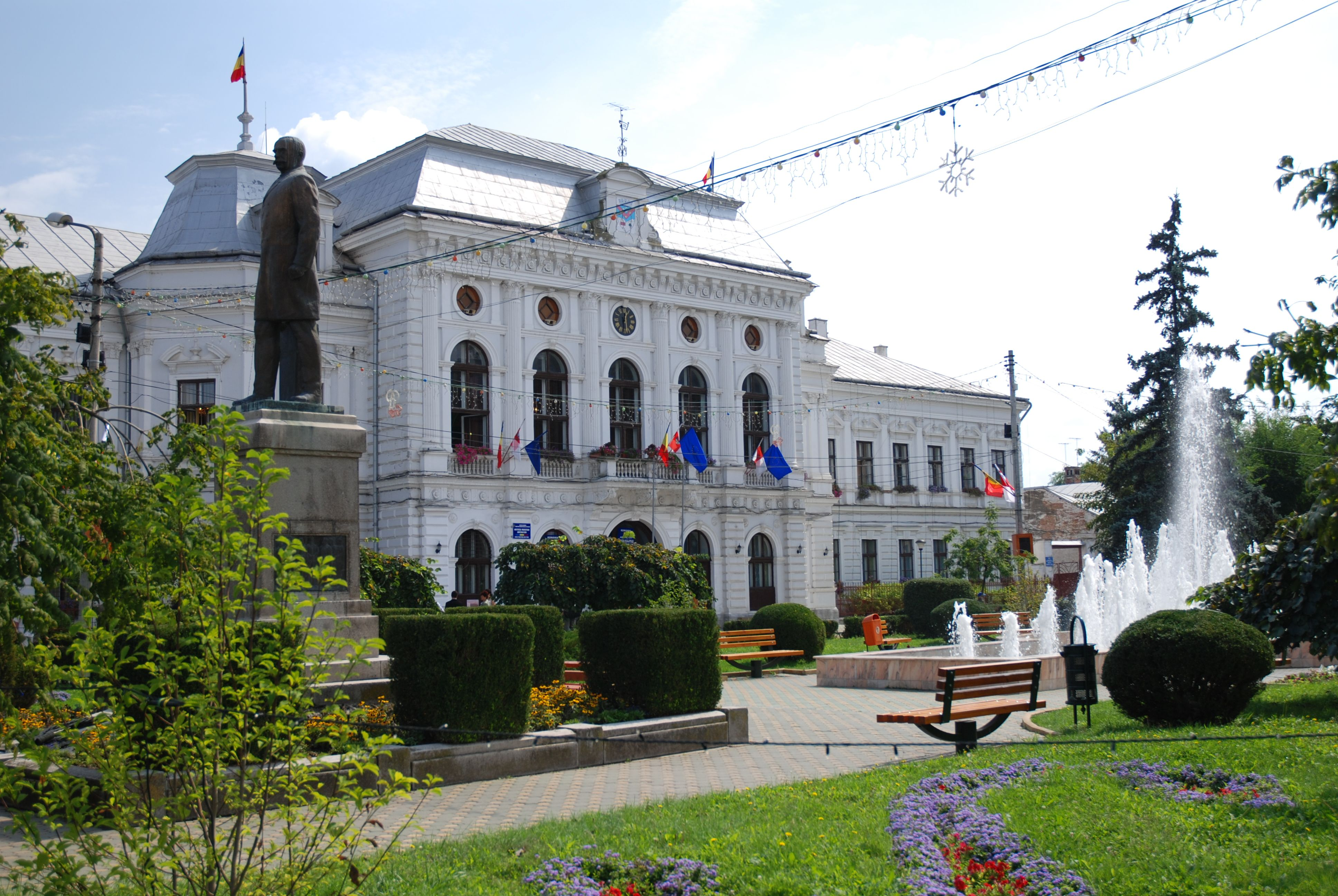 Primăria Municipiului Turda, Transilvania, Romania